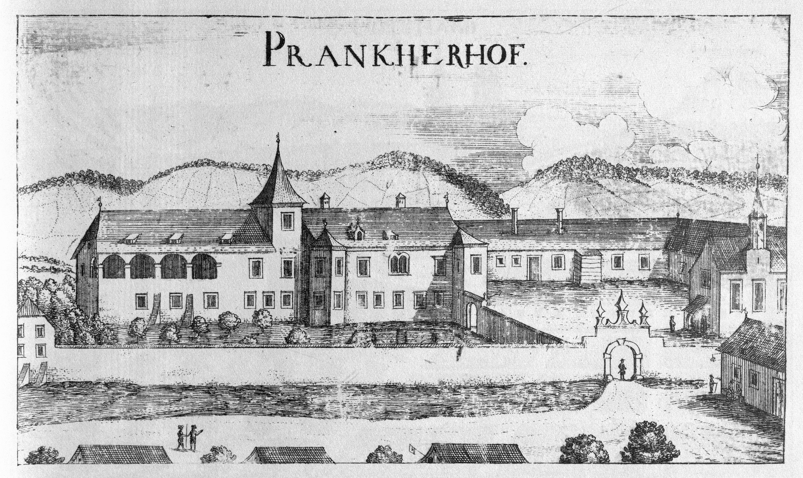 G. M. Vischers Käyserlichen Geographi, Topographia Ducatus Stiriae, Das ist: Eigentliche Delineation / und Abbildung aller Städte / Schlösser / Marcktfleck / Lustgärten / Probsteyen / Stiffter / Clöster und Kirchen / so es sich im Herzogthumb Steyrmarck befinden; Und anjetzo Umb einen billichen Preyß zu finden seynd Bey Johann Bitsch Universitäts Buchhandlern / Auff dem Juden=Platz bey der guldenen Saulen. Graz 1681 Die Nummerierung der Dateien folgt der alphabetischen Reihung der Ortsnamen